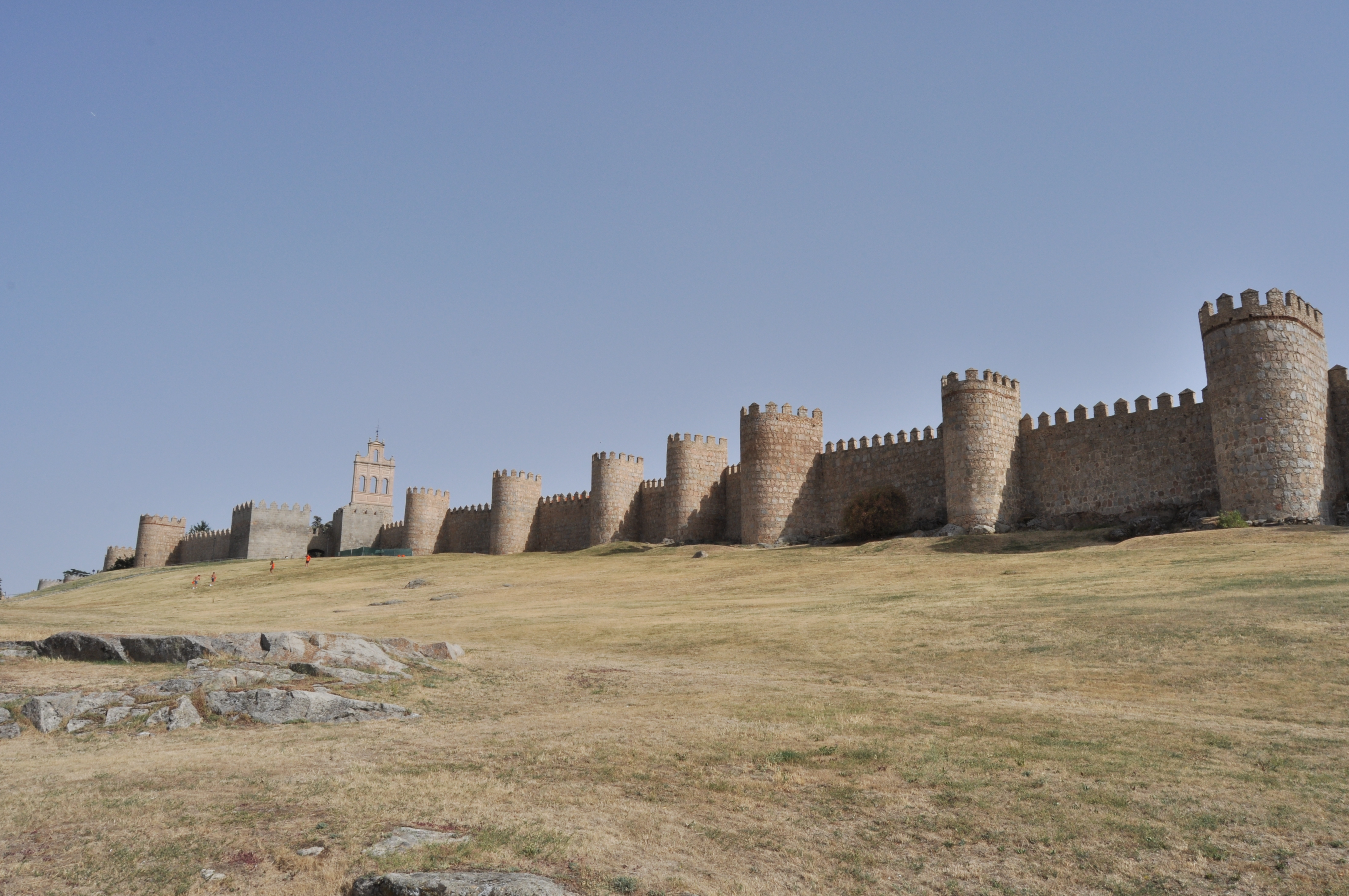 Avila Capital - 012